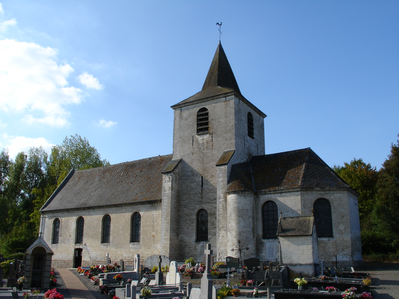 Église de Teneur